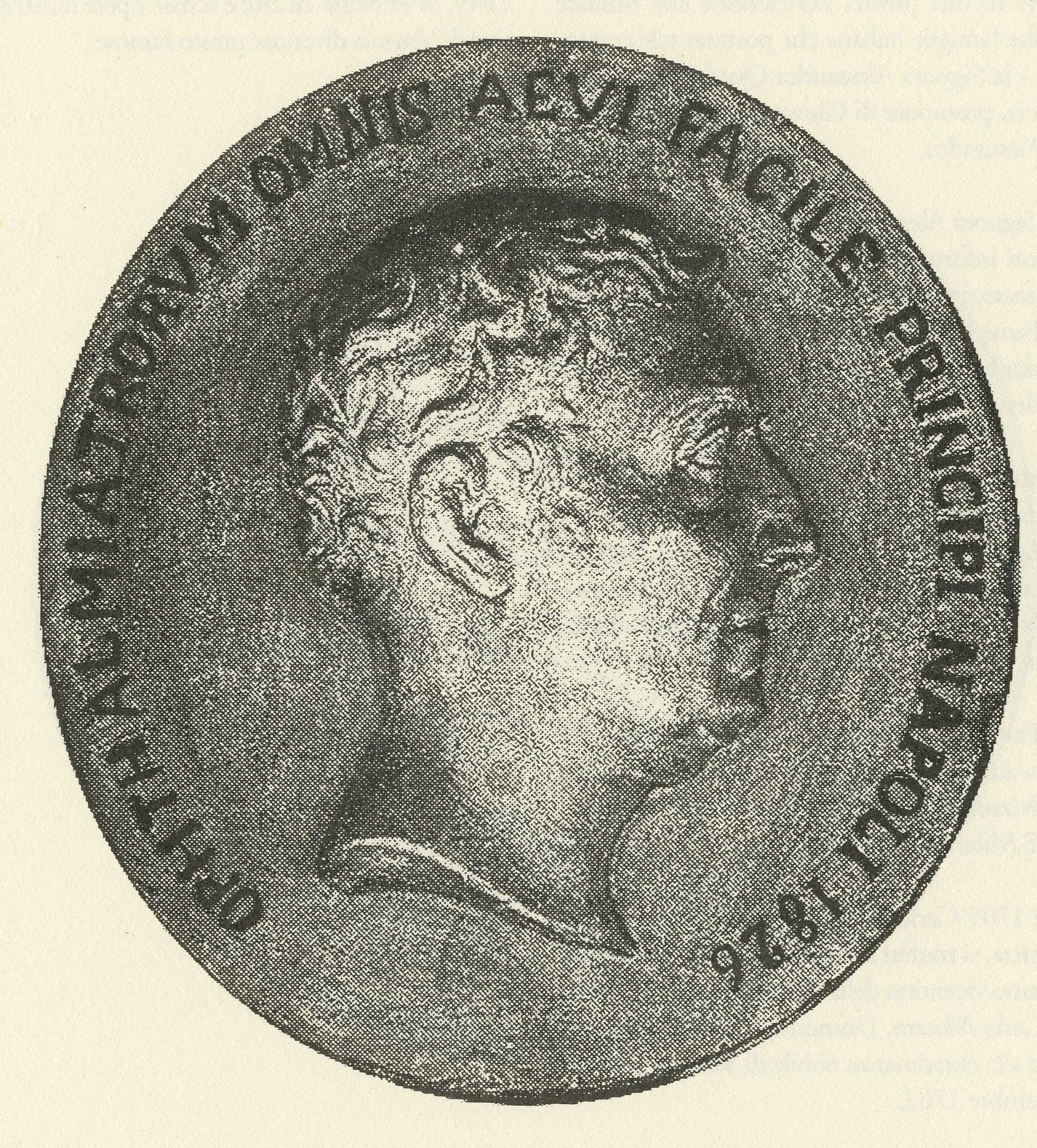 Medaglia del 1826 raffigurante Giovanni Battista Quadri